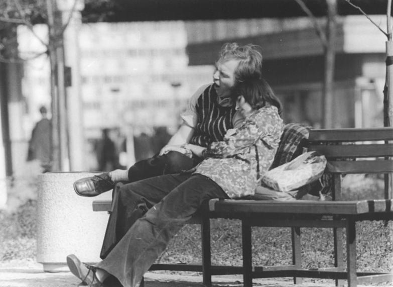 Berlin, Straßenszene ADN-ZB Mittelstädt 10.3.75 Berlin- Frühjahrsmüde scheint dieses Pärchen zu sein, das unser reporter am Fuße des Fernsehturms auf den Film bannte.